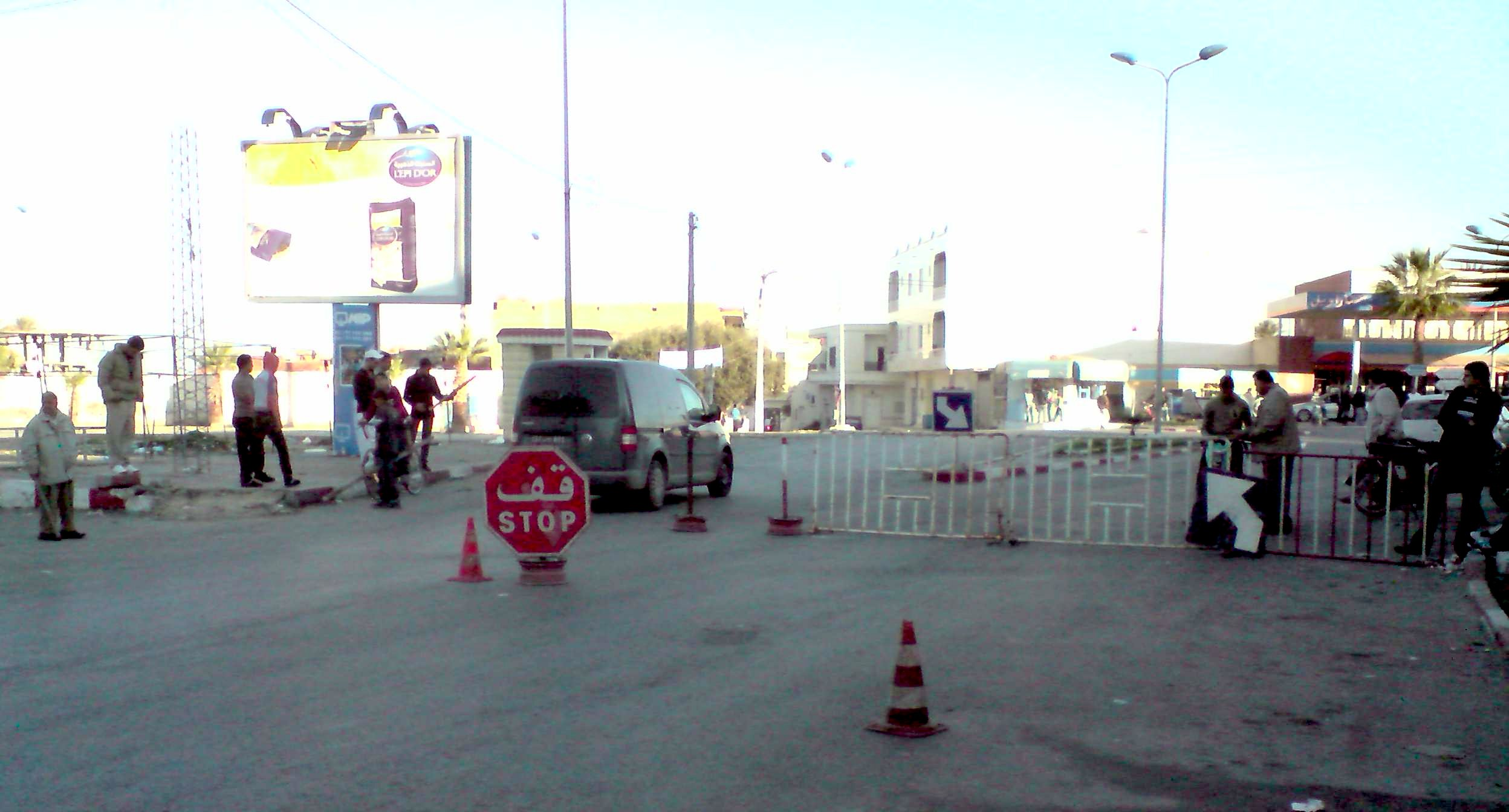 Barrage routier mis en place par le Comité vigile du quartier en l'absence des forces de l'ordre, Sayada, Tunisie.